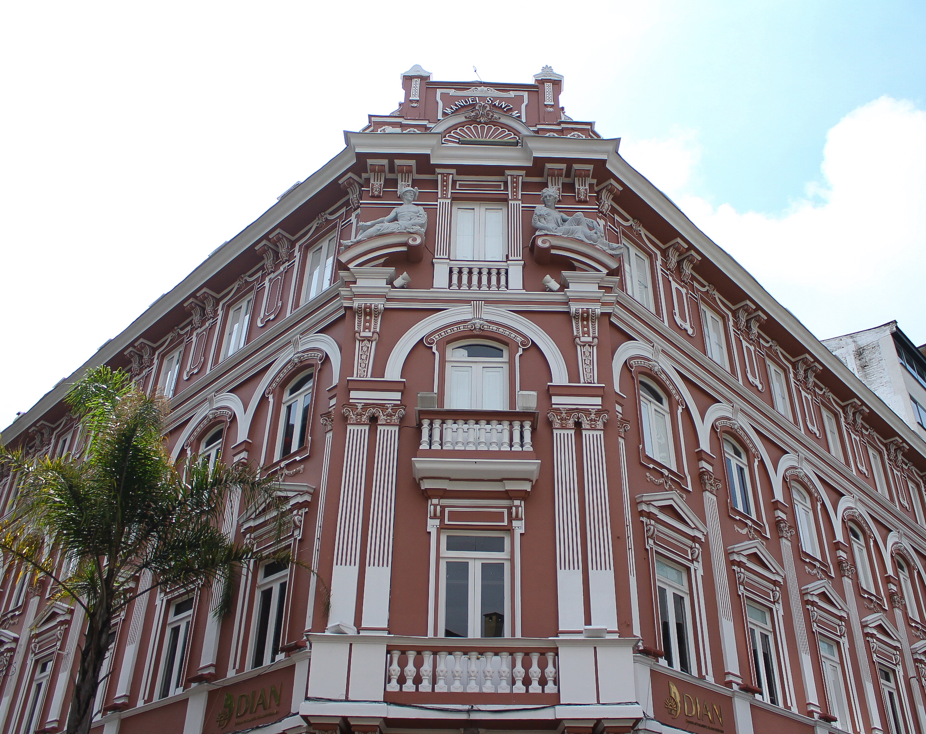 Conjunto de Inmuebles de Arquitectura Republicana localizados en el Centro de Manizales